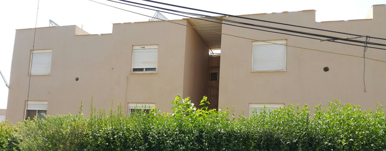 הבניין שבו נרצחה משפחת כהן במעלות